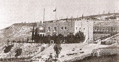 foto z roku 1938